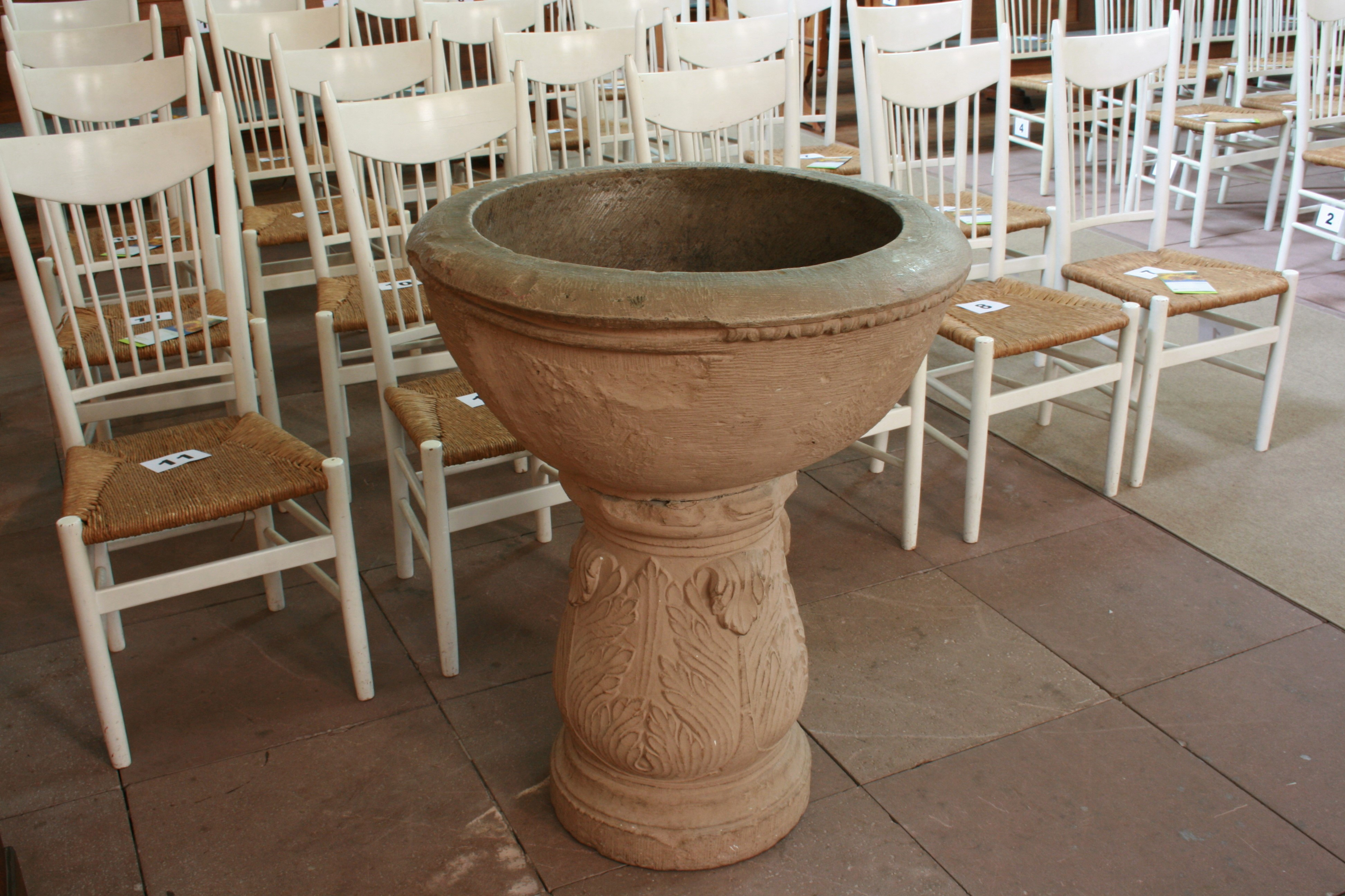 Evangelische Stadtkirche in Rotenburg (Wümme)